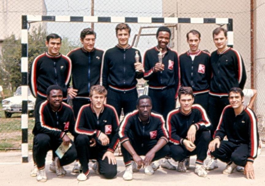 equipe type de la "Buscaglione Roma Club" qui a gagné le premier champîonnat d'Italie de Handball (Pallamano) - 1970